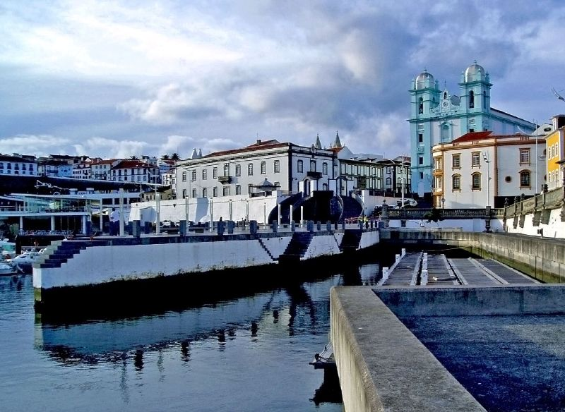 Baía d'Angra